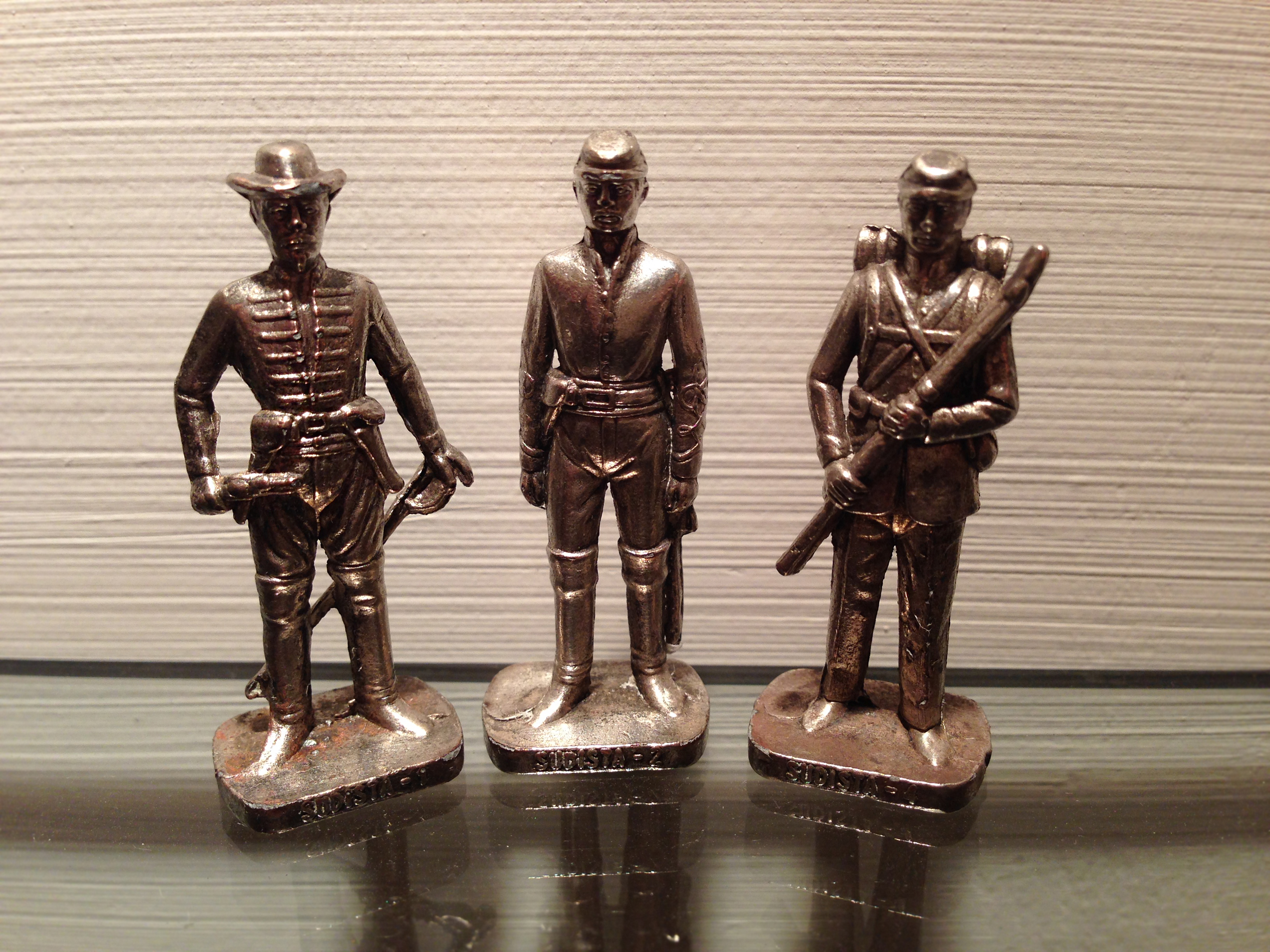 Gadget in metallo raffiguranti soldatini americani, probabilmente della guerra di secessione.